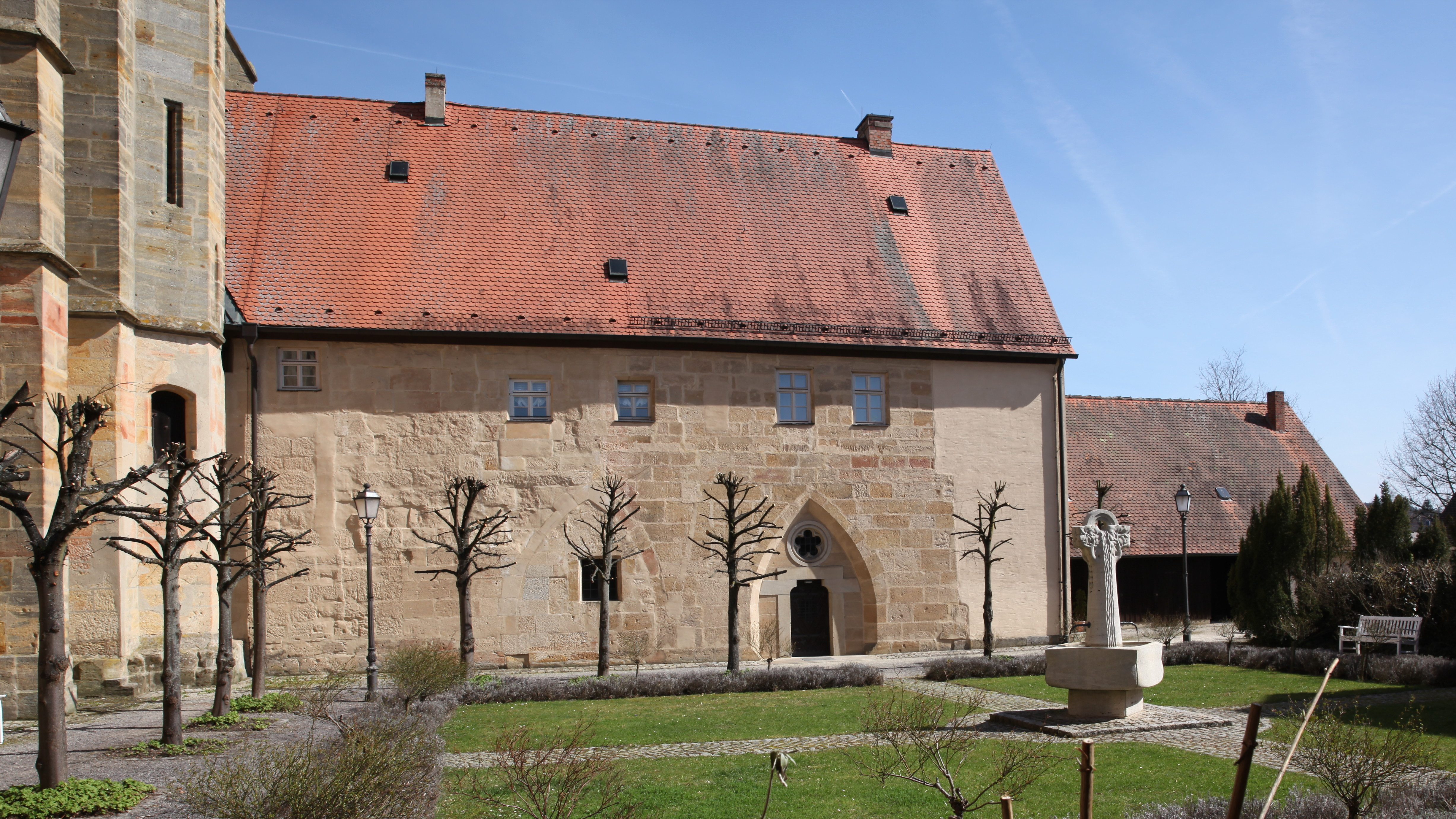 Klosterhof 3 in Sonnefeld, Landkreis Coburg